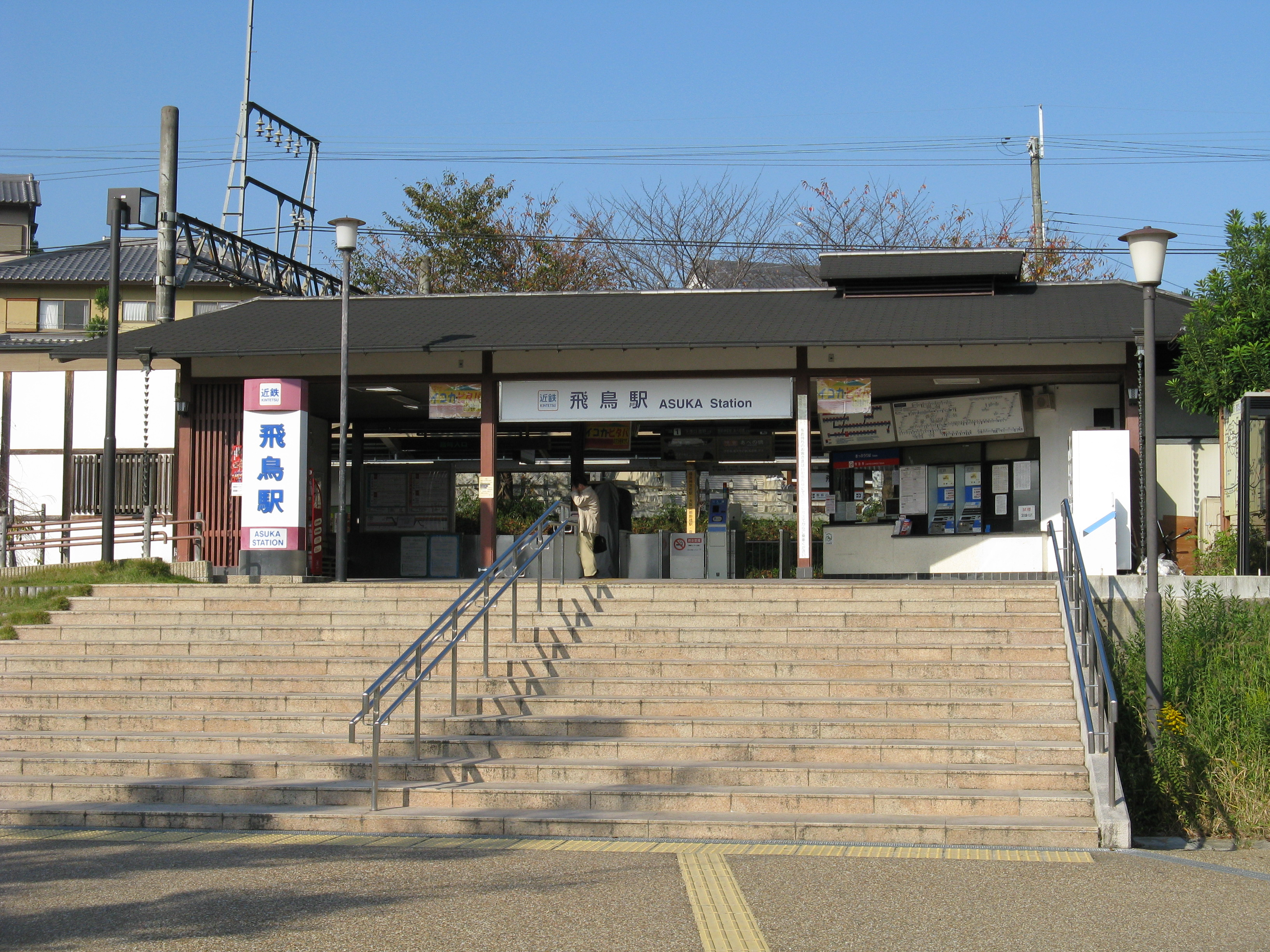 飛鳥駅